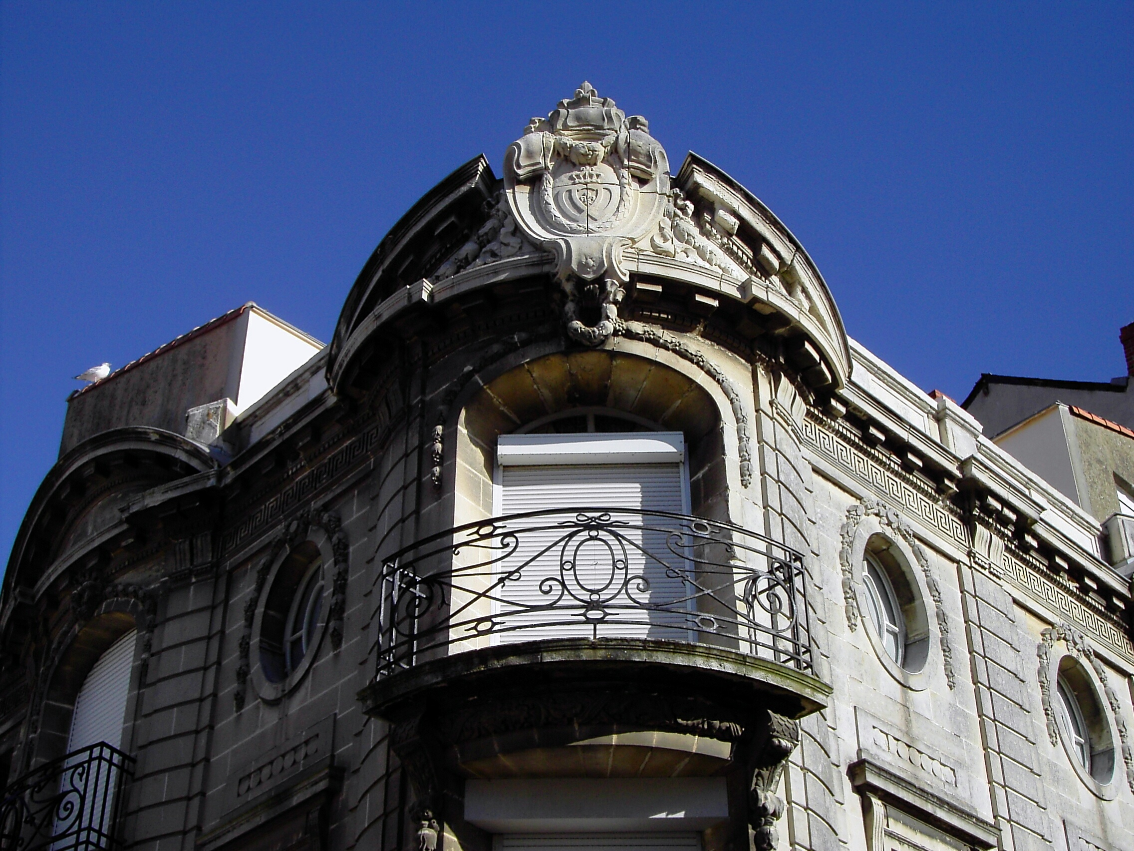 Les Sables-d'Olonne: un detail